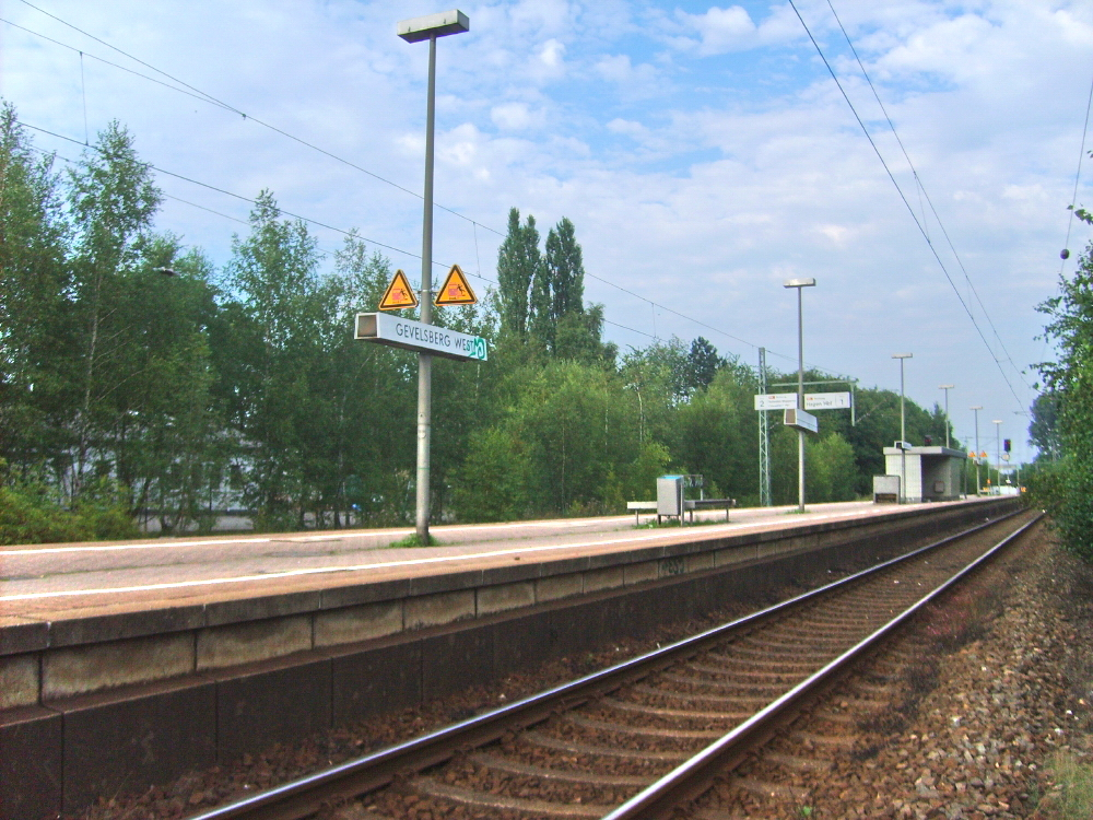 Bahnhof Gevelsberg West, Germany